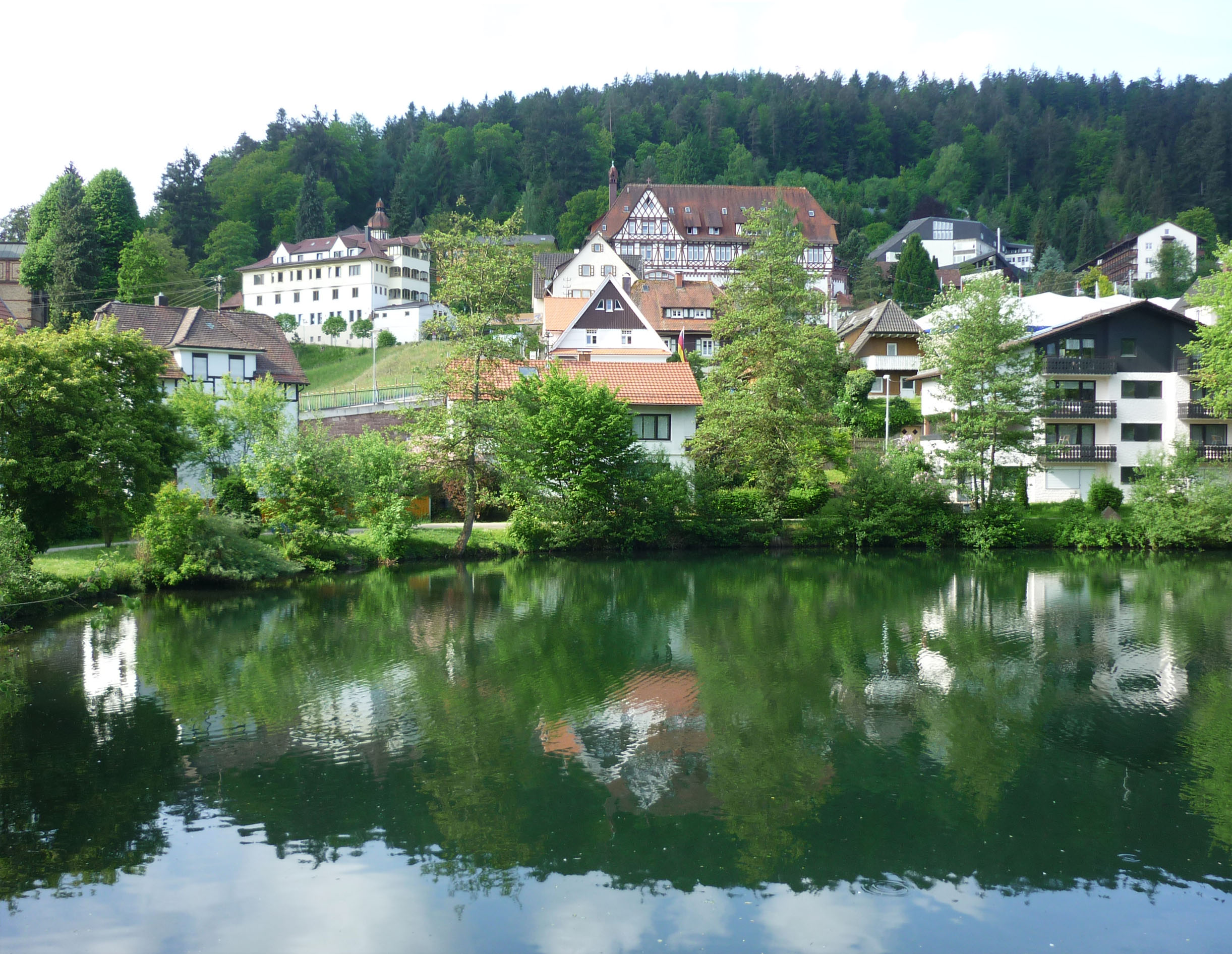 Gebäude der Liebenzelle Mission in Bad Liebenzell im Lkr. Calw (Württemberg)